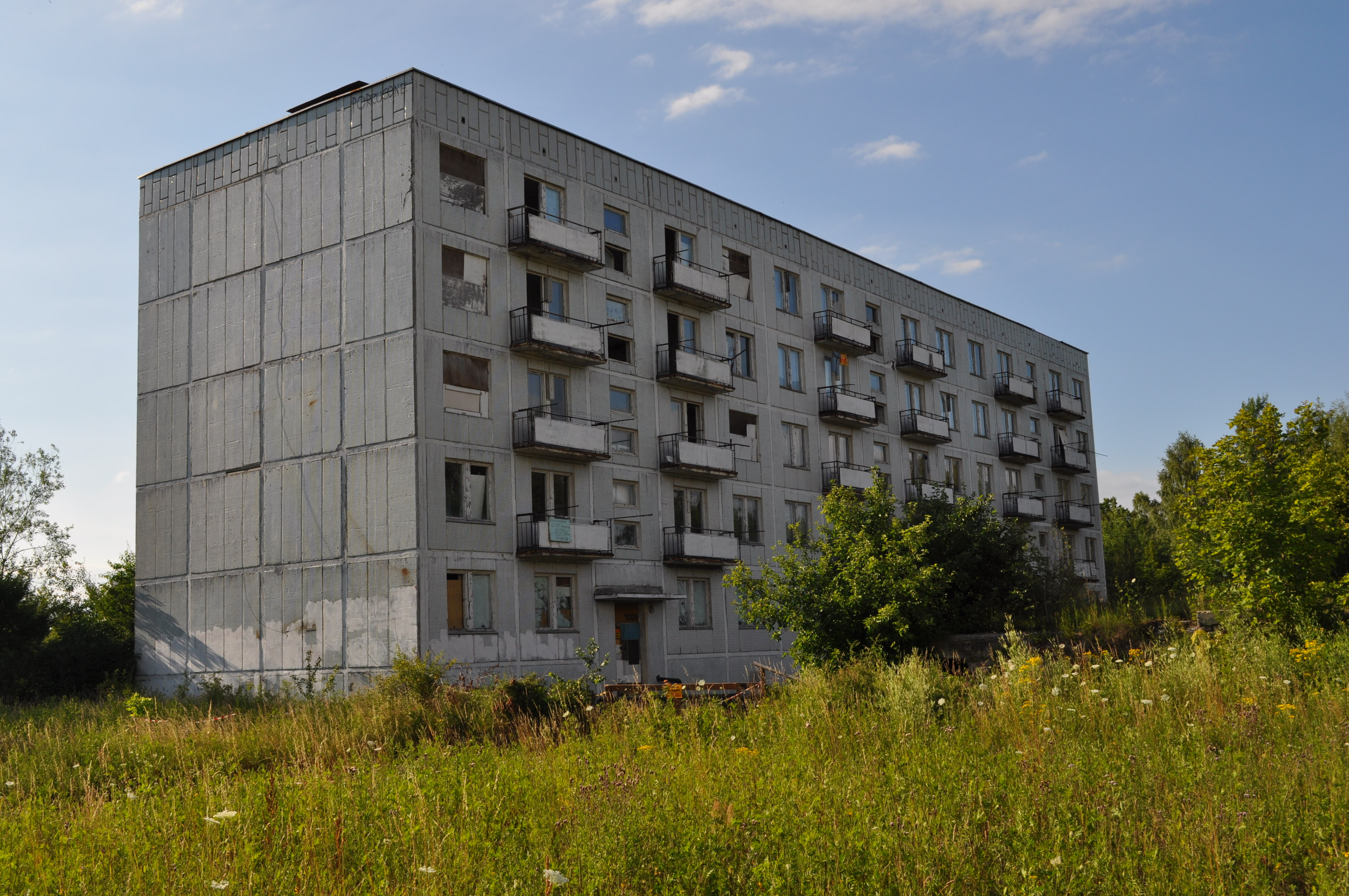 Kłomino. Jedyny zamieszkany obecnie blok. Stan na lipiec 2011.